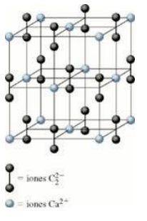 Kaltzio karburoa